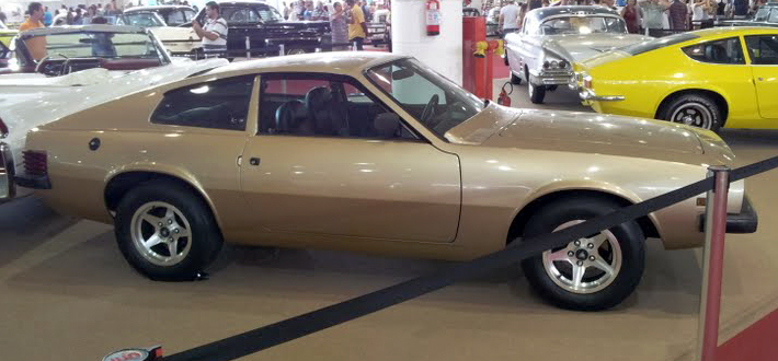 Puma GTB-S2